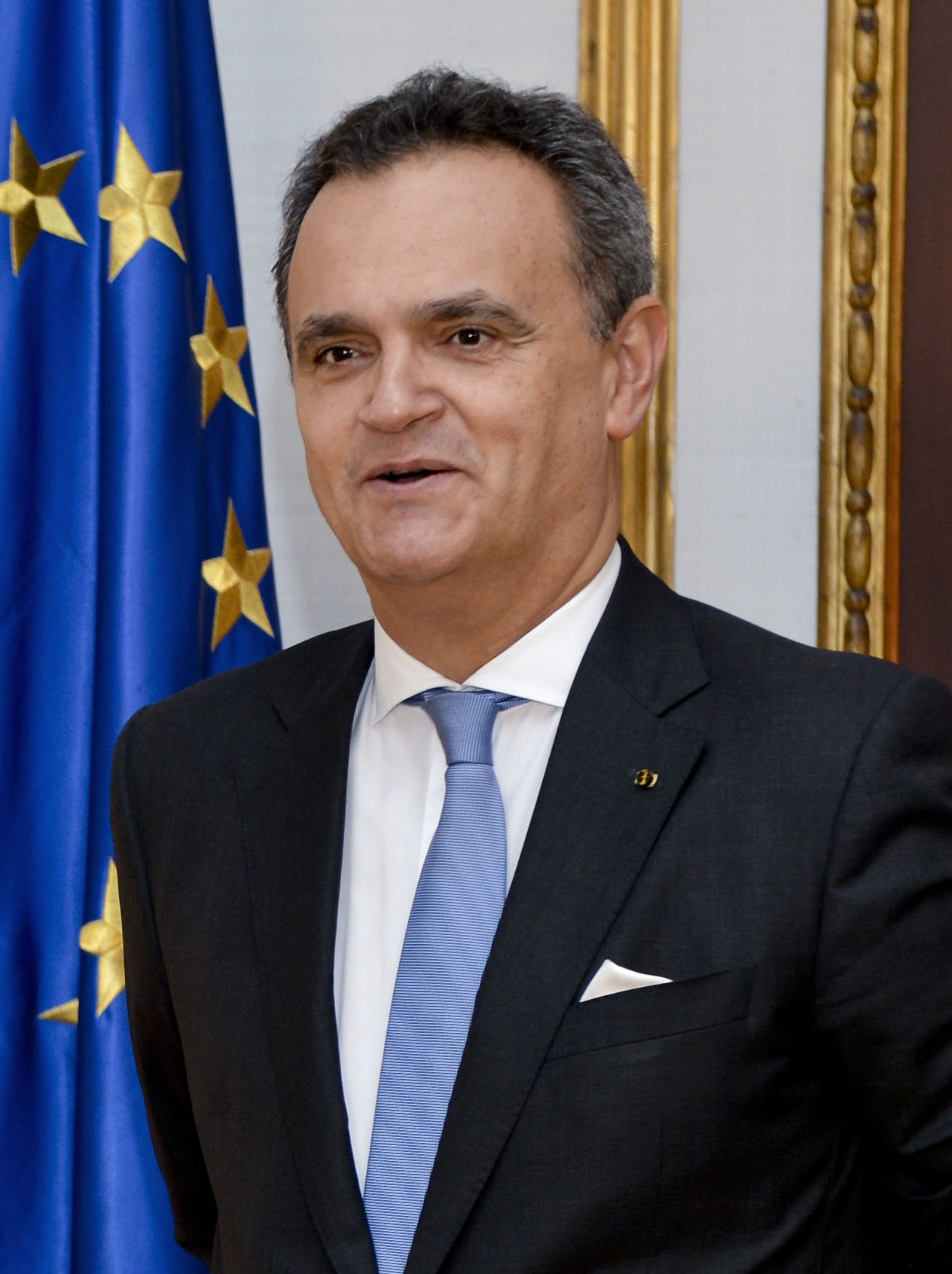 14.12.04 Embajador de Portugal 1